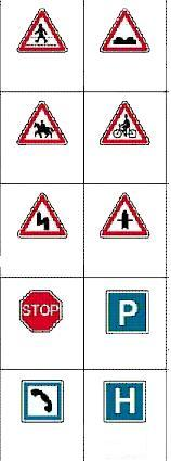 Señales de tráfico, como lenguaje formalizado own work 05/01/2007 MONIMINO